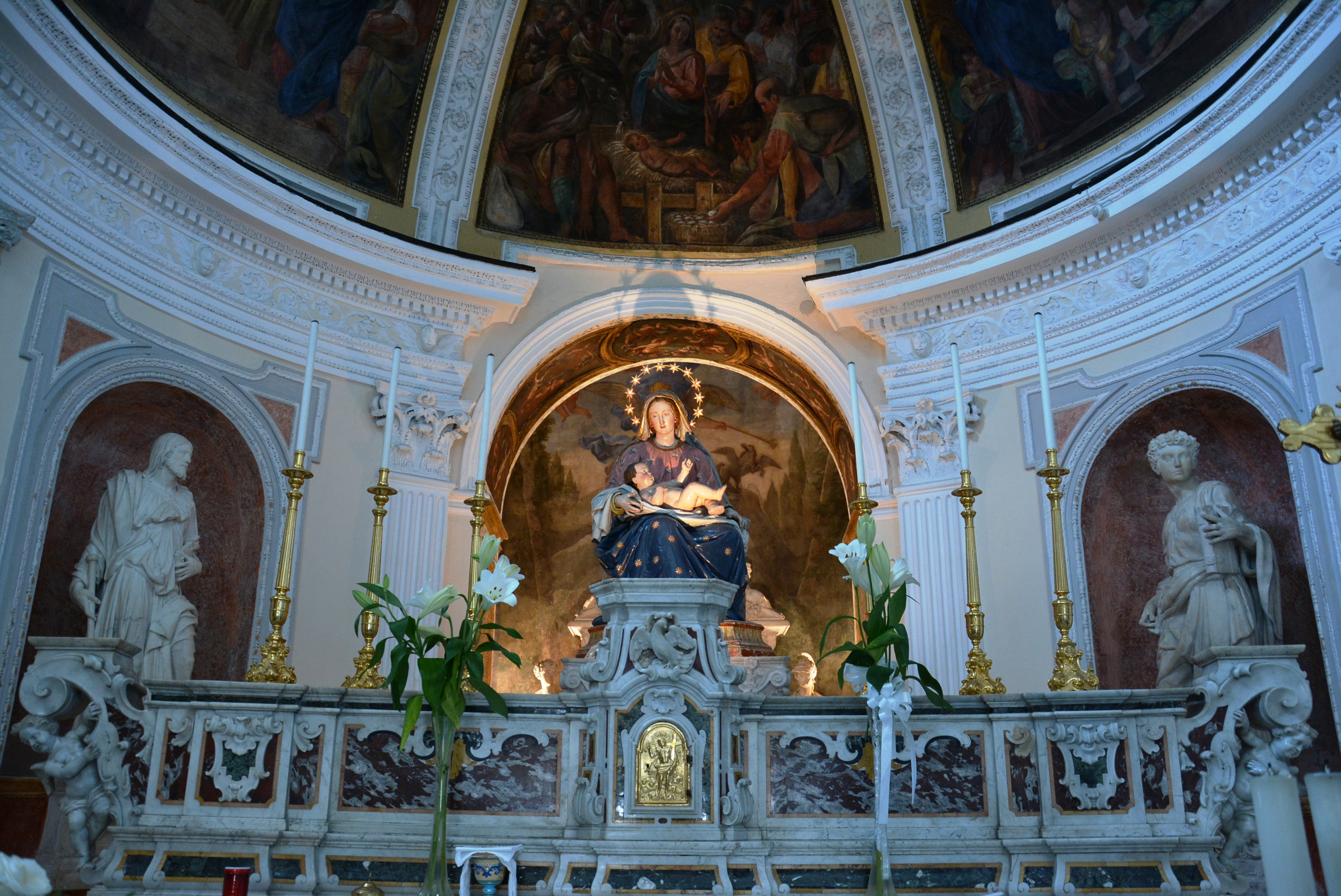 Chiesa di Santa Maria del Parto a Mergellina, a Napoli